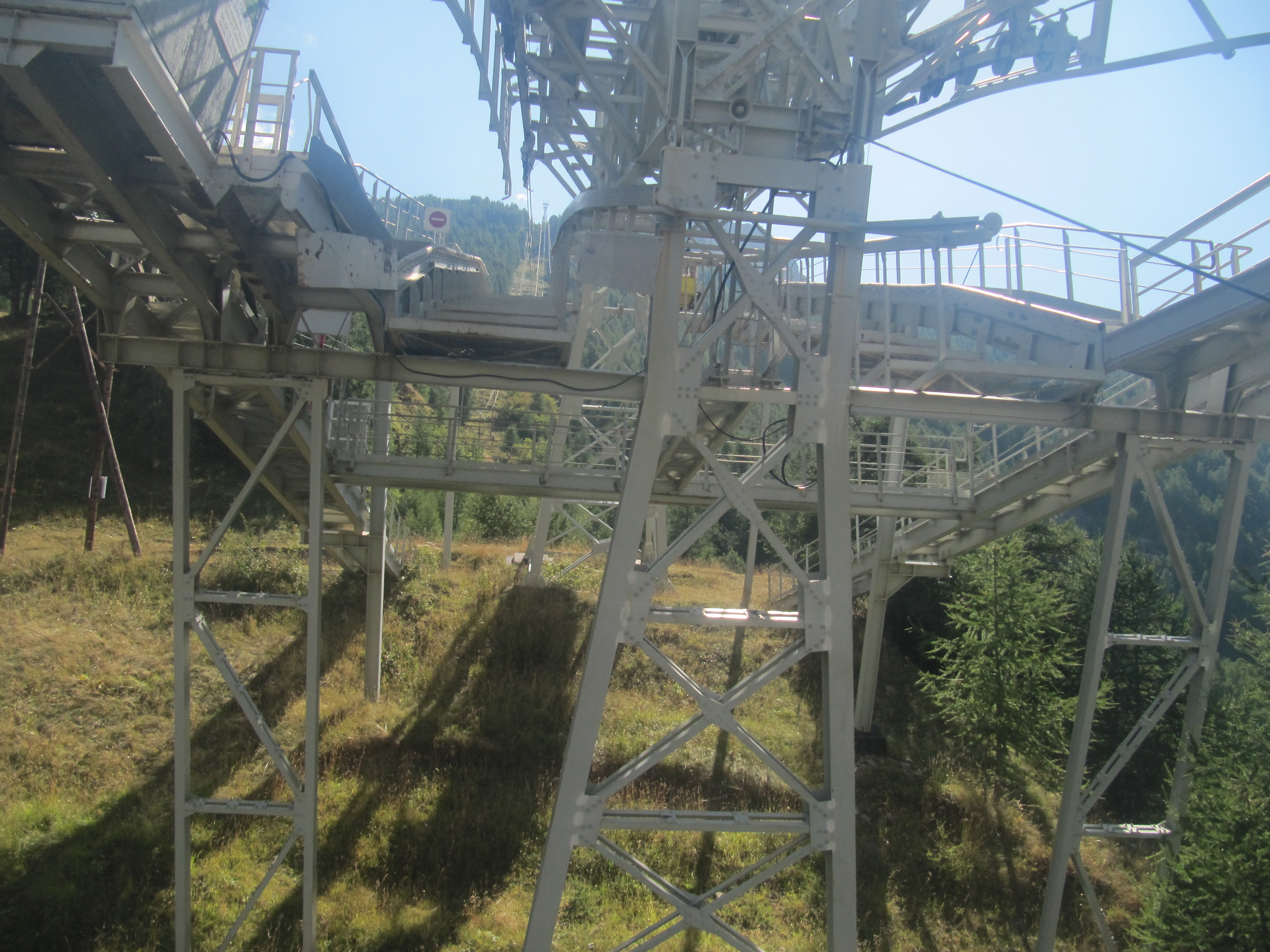 Le pylône assurant la gare intermédiaire du premier tronçon du 2S Pulsé de la Grave